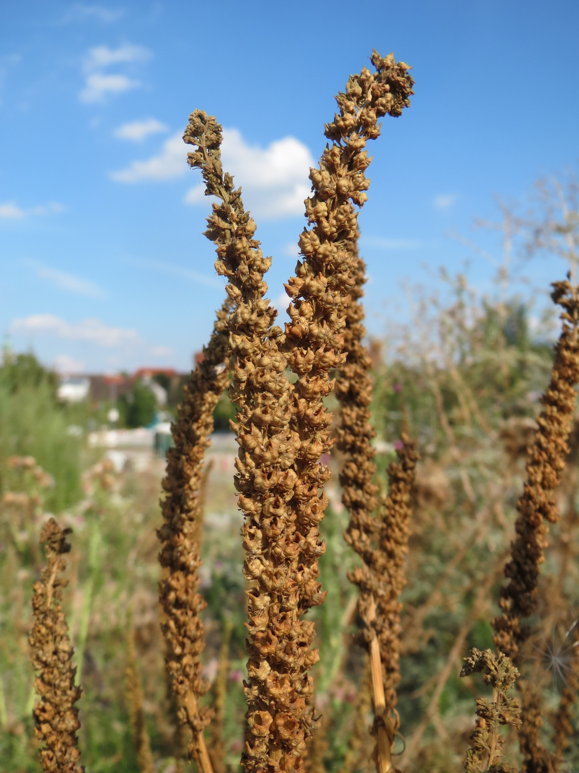 Färber-Wau (Reseda luteola) auf einem Sandhügel einer Baustelle in Hockenheim